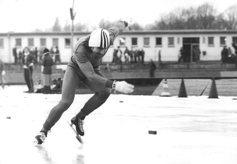 Uwe Sauerteig ADN-ZB Spremberg 6.2.77-str-Karl-Marx-Stadt: DDR-Eisschnellaufmeisterschaften der Sprinter-Nach der Hälfte der vier Läufe um den DDR-Meistertitel leigt Uwe Sauerteig (SC Turbine Erfurt) klar in Führung. Er gewann am 5.2. sowohl die 500m in 40,0 s als auch die 1000m im 1:21,5 min. Die Entscheidung um den Titel fällt am 6.2. (Foto von einem früheren Wettkampf)